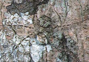 female Hersilia yaeyamaensis from Okinawa.